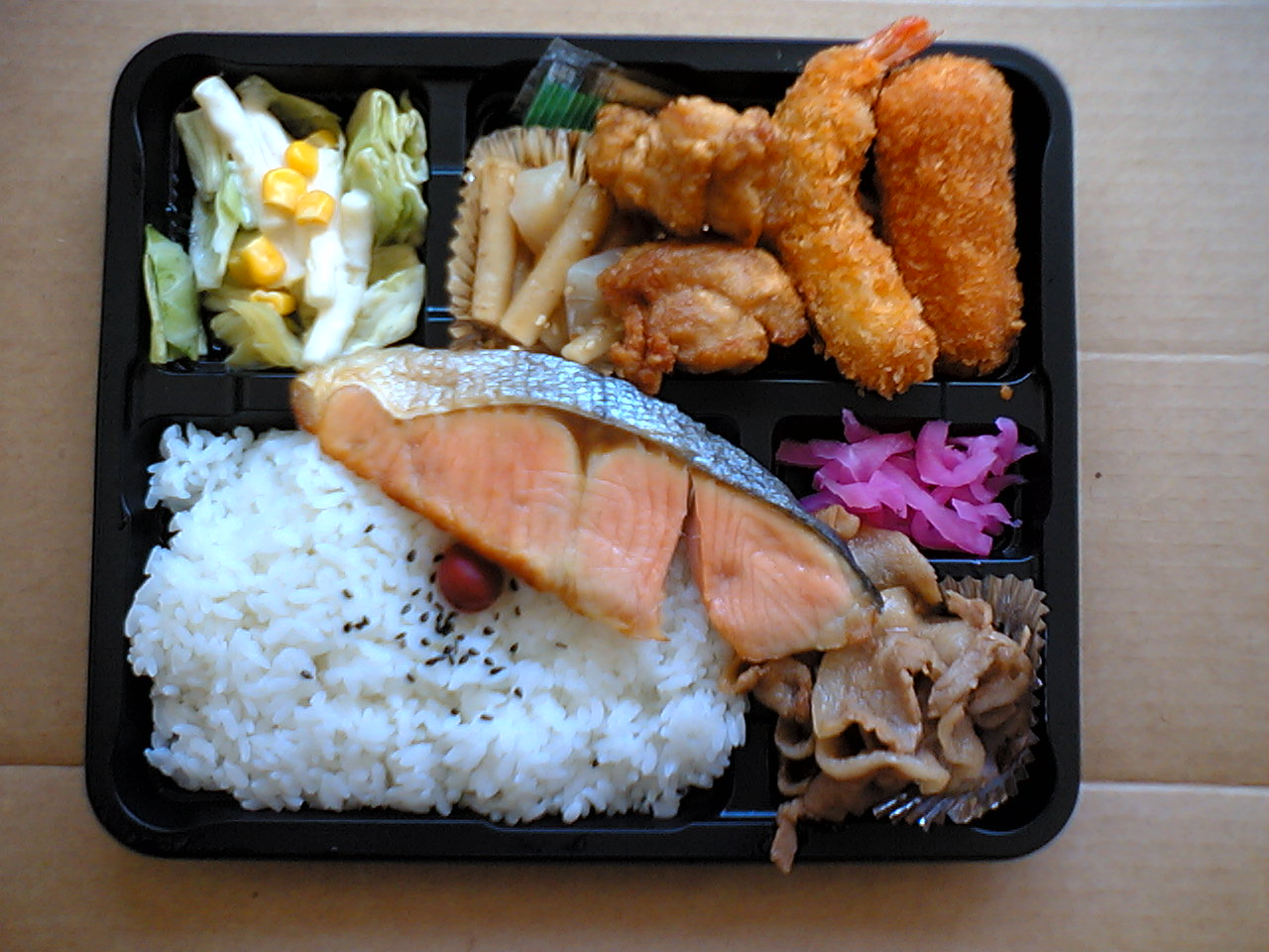 Japonia bentoMi fotis kaj mangis meme:)